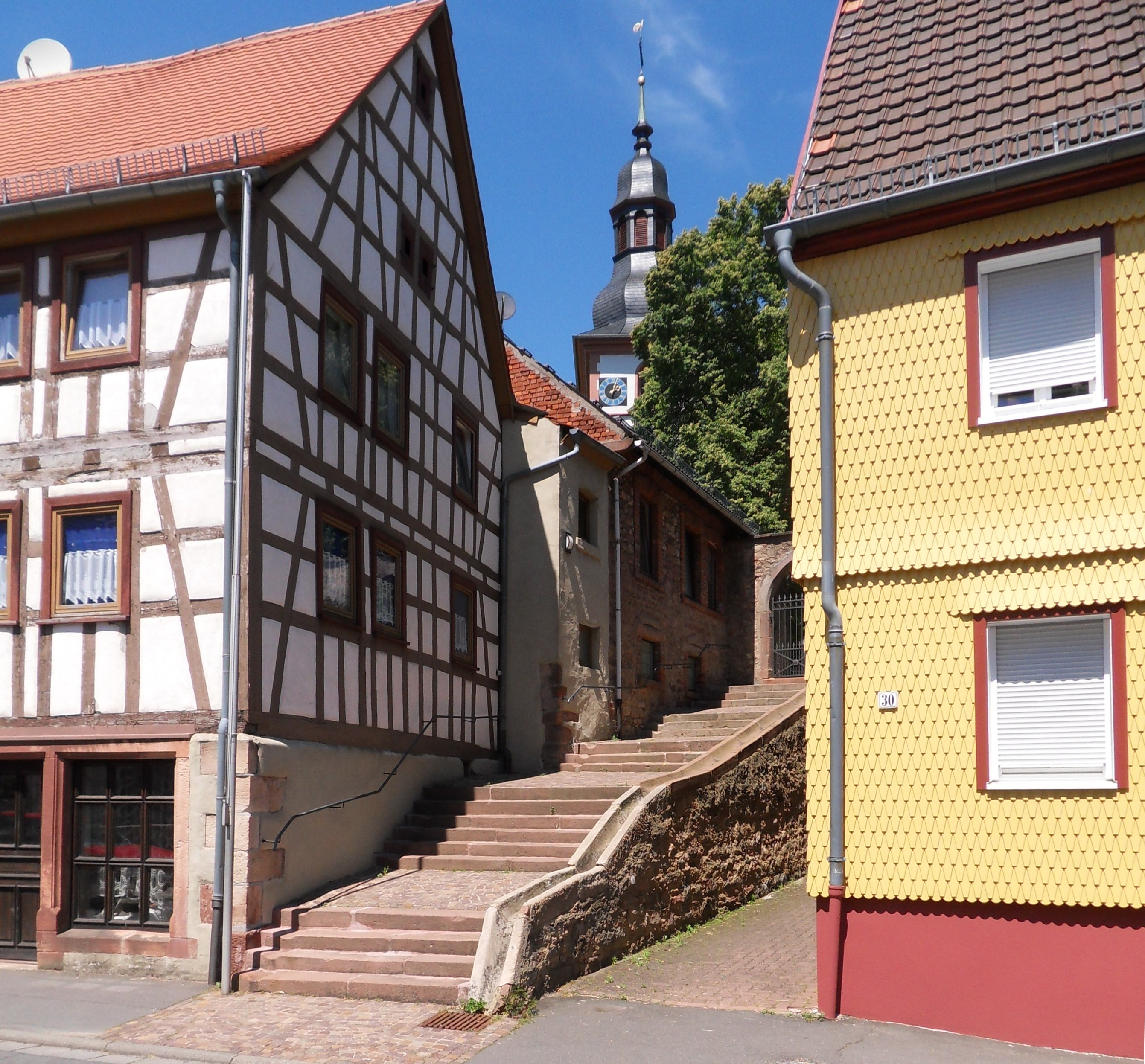 Treppenanlage, die von der Hauptstraße in Kirchbrombach zum Kirchhof führt